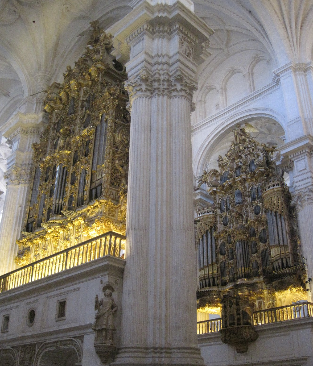 Beide Orgeln der Kathedrale in Granada, Spanien